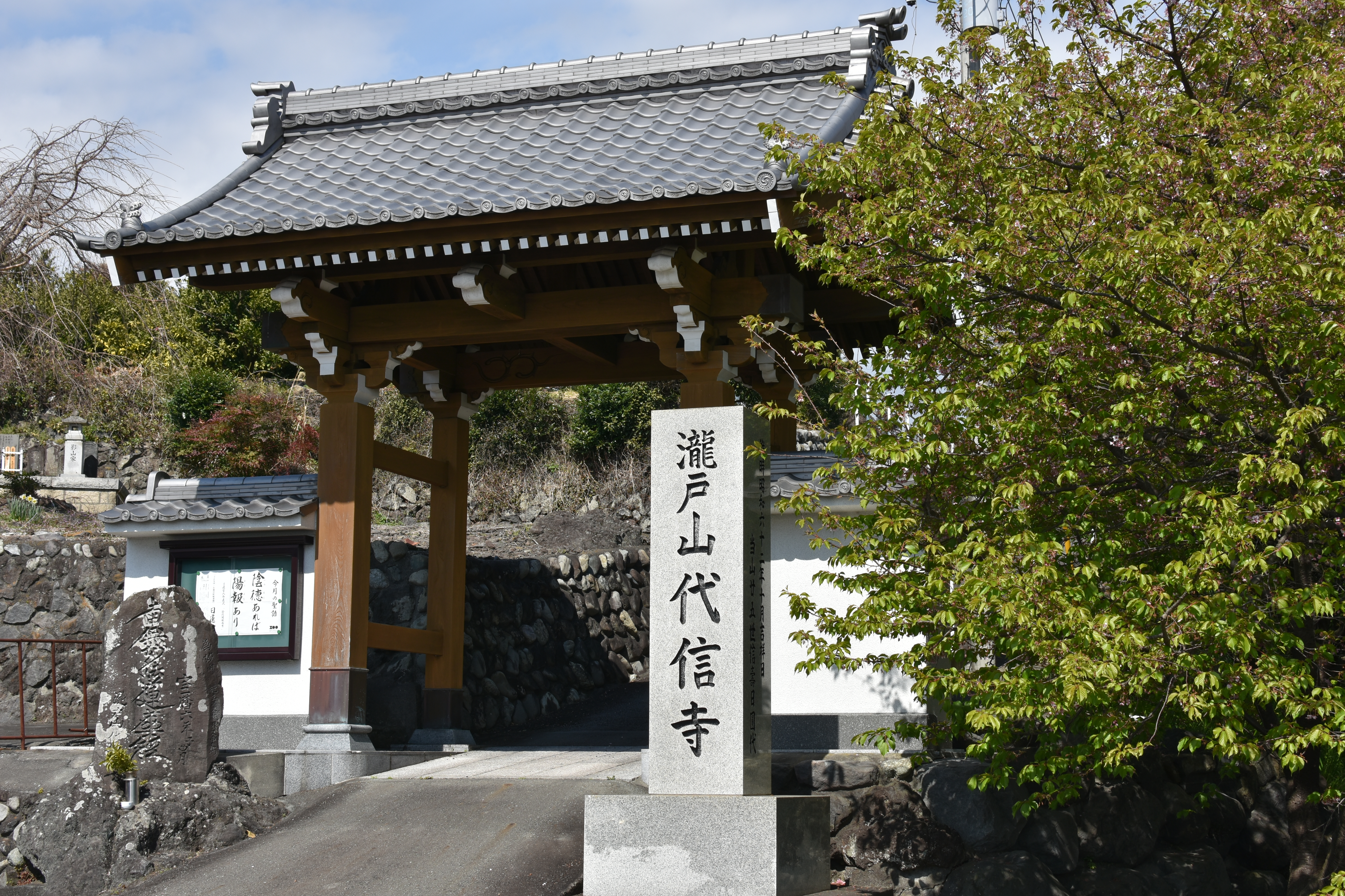 代信寺（静岡県富士宮市山本）の山門